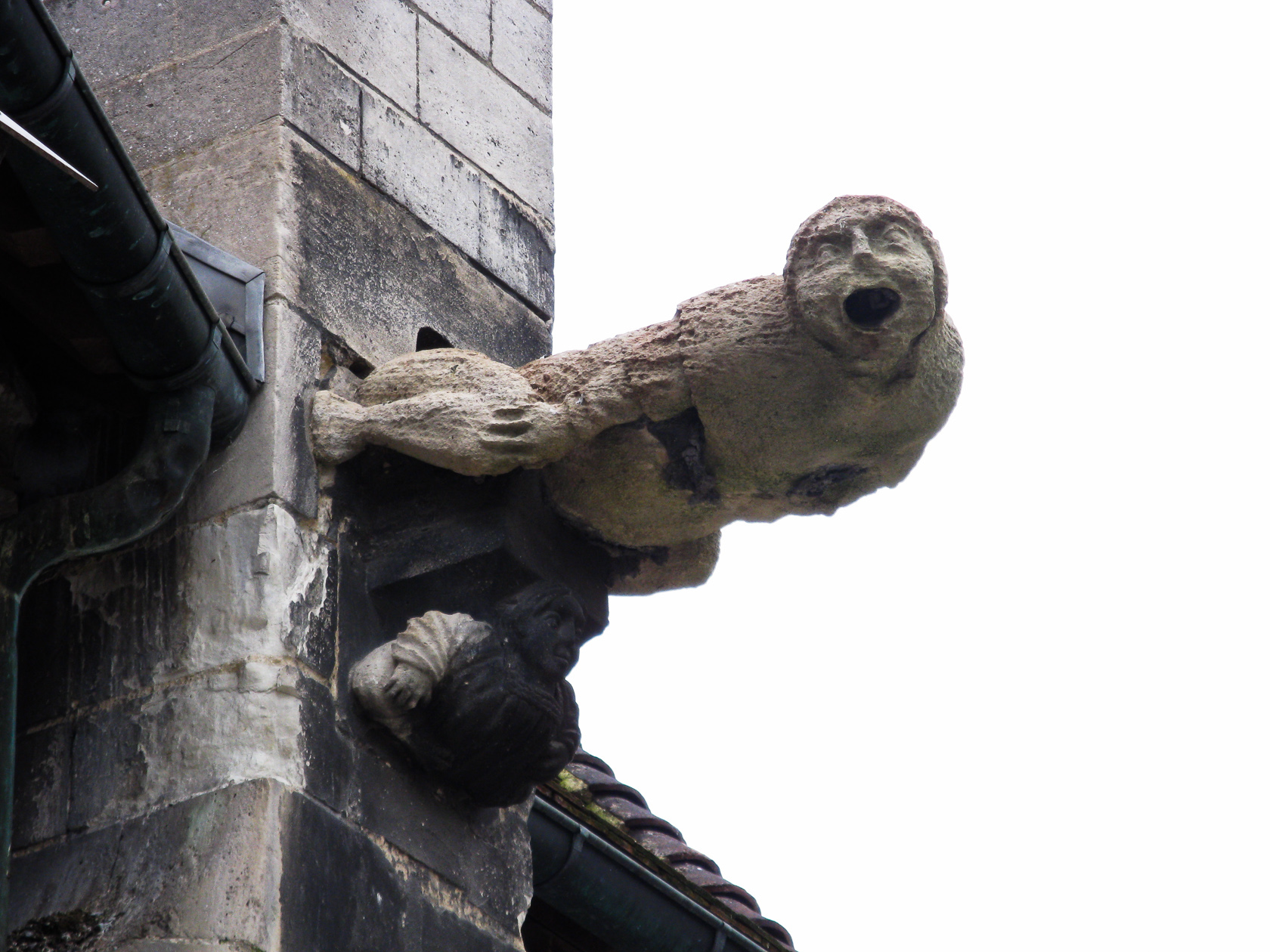 Église Saint-Nizier (Classé) - Détail .